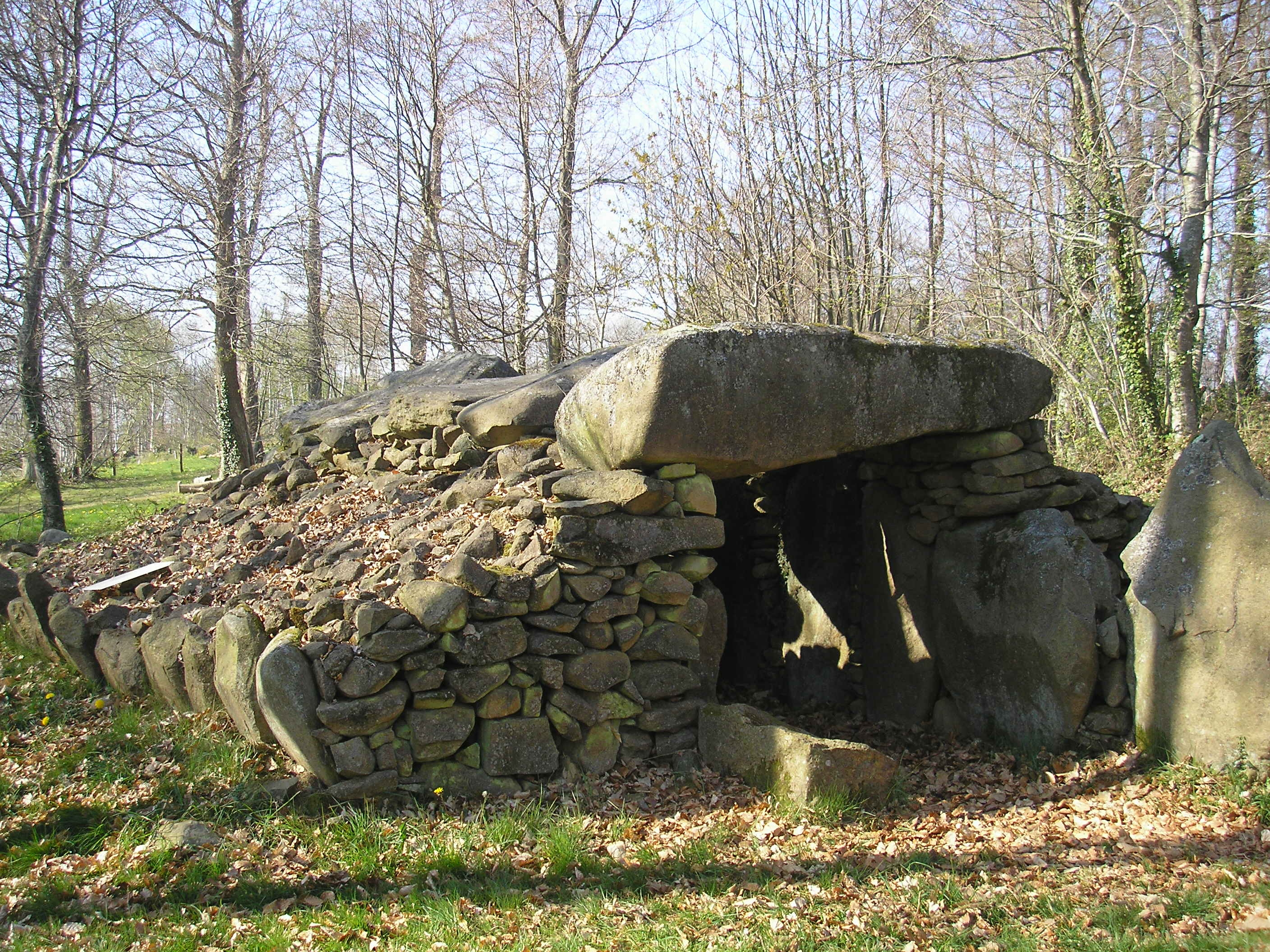 Saint-Mars-sur-la-Futaie (Pays de la Loire, France). L'allée couverte de la Louvetière.